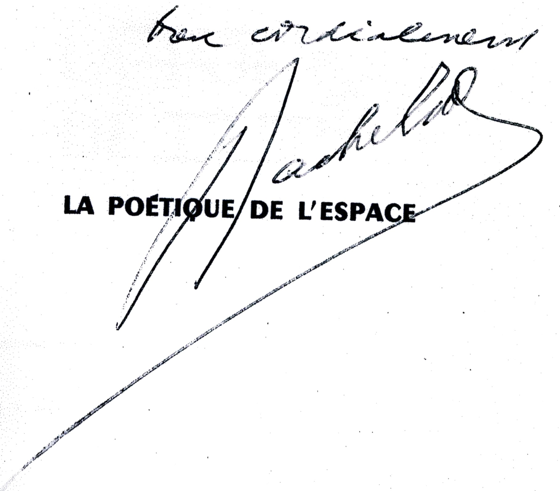 Signature du philosophe Gaston Bachelard, scan d'après livre dédicacé. This signature is believed to be ineligible for copyright and therefore in the public domain because it falls below the required level of originality for copyright protection both in the United States and in the source country (if different). In this case, the source country (e.g. the country of nationality of the signatory) is believed to be France. Cette image ou le texte qui y est représenté est seulement composé de formes géométriques simples et de texte. Elle n’atteint pas le seuil d'originalité nécessaire pour la protection du droit d’auteur, et est donc du domaine public.